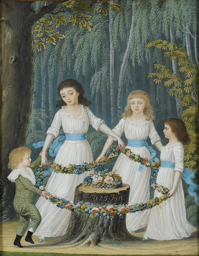 Der 69 te Herr [von Reuss], Comtesse Constance, Emilie und Theresa aus Köstritz, gemahlt von J. Reinhold aus Gera, den 25 ten Januar 1796 Kinder von von Graf Heinrich XLVIII. von Reuß (1759–1825) und Gräfin Christine Henriette Antonie von Schönburg-Wechselburg-Forderglauchau (1766–1833): Graf Heinrich LXIX. (* 1792), Konstanze (* 1785), Emilie (* 1787), Therese (* 1790)